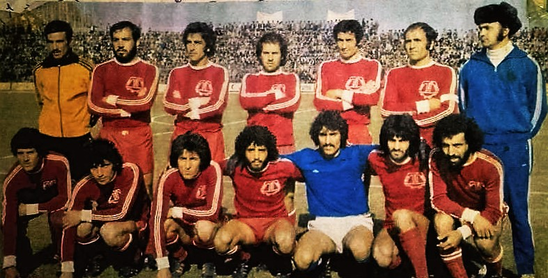 باشگاه فوتبال ماشین سازی تبریز در جام تخت جمشید 1352، ورزشگاه باغشمال.